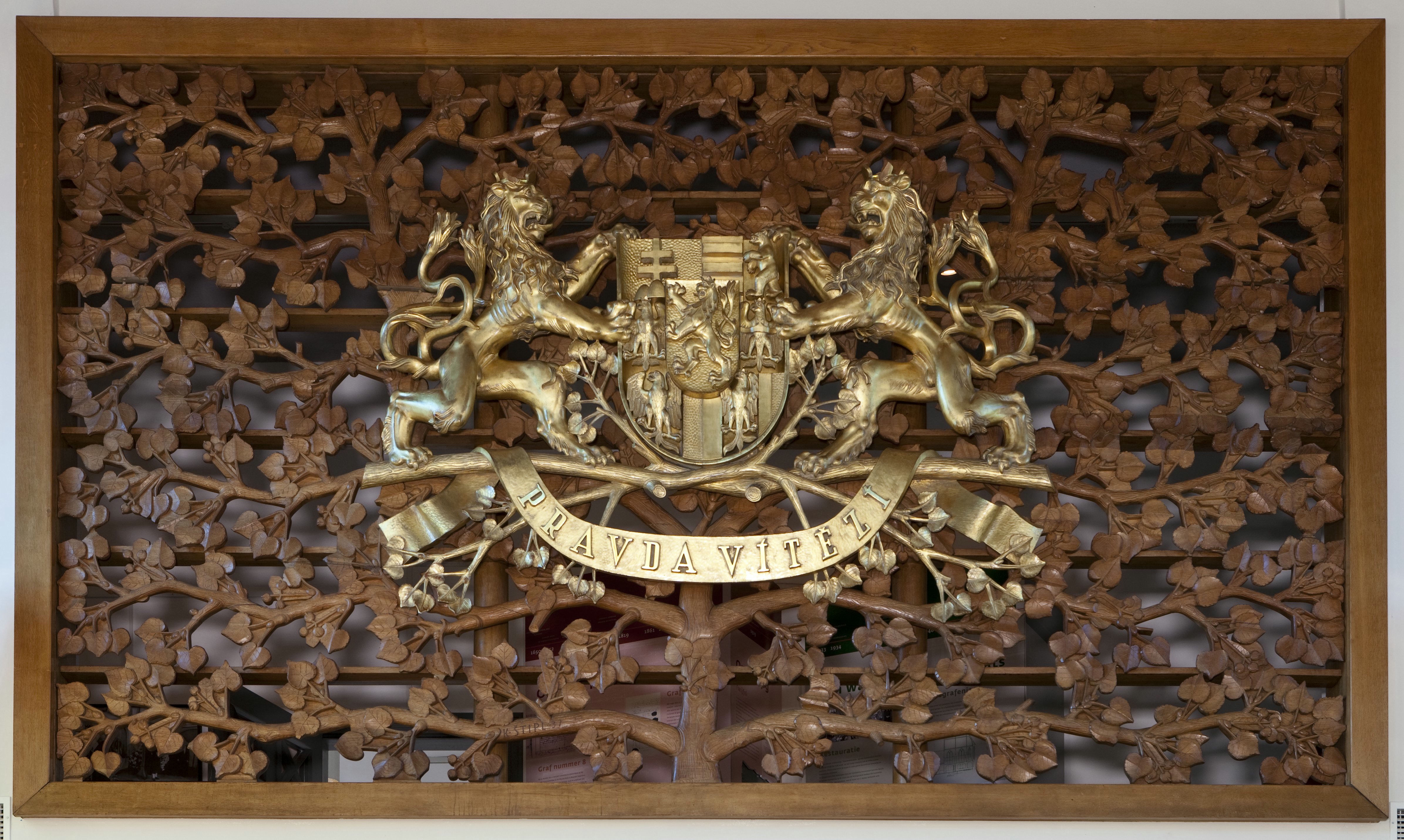 Comeniuskapel - Comenius-mausoleum: Interieur, houtsnijwerken plateau (opmerking: Gefotografeerd t.b.v. Tijdschrift Rijksdienst voor het Cultureel Erfgoed)